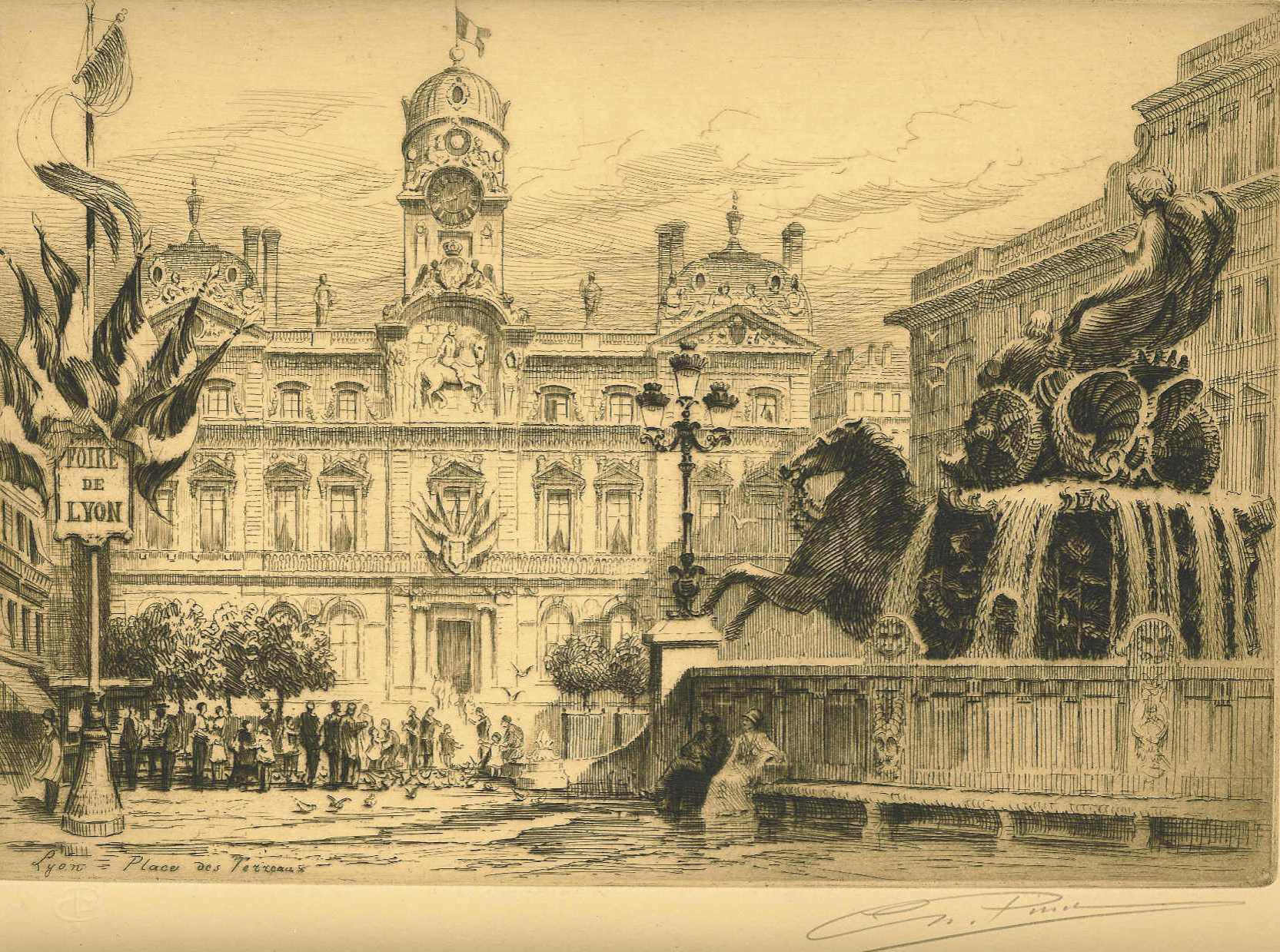 Lyon, Place des Terreaux - gravure de Charles Pinet (19,5 x 28 cm ?)